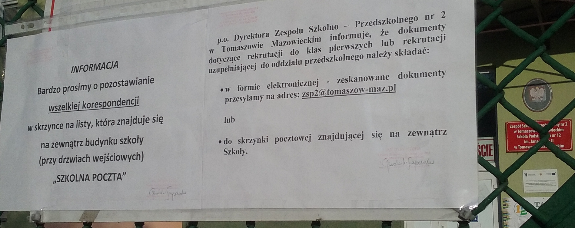 COVID-19 w Polsce. Informacja na szkolnej bramie o składaniu dokumentów ws rekrutacji dzieci do pierwszych klas szkoły podstawowej drogą elektroniczną lub poprzez skrzynkę podawczą przy szkole. SP 12, ul. Wiejska, Tomaszów Maz.